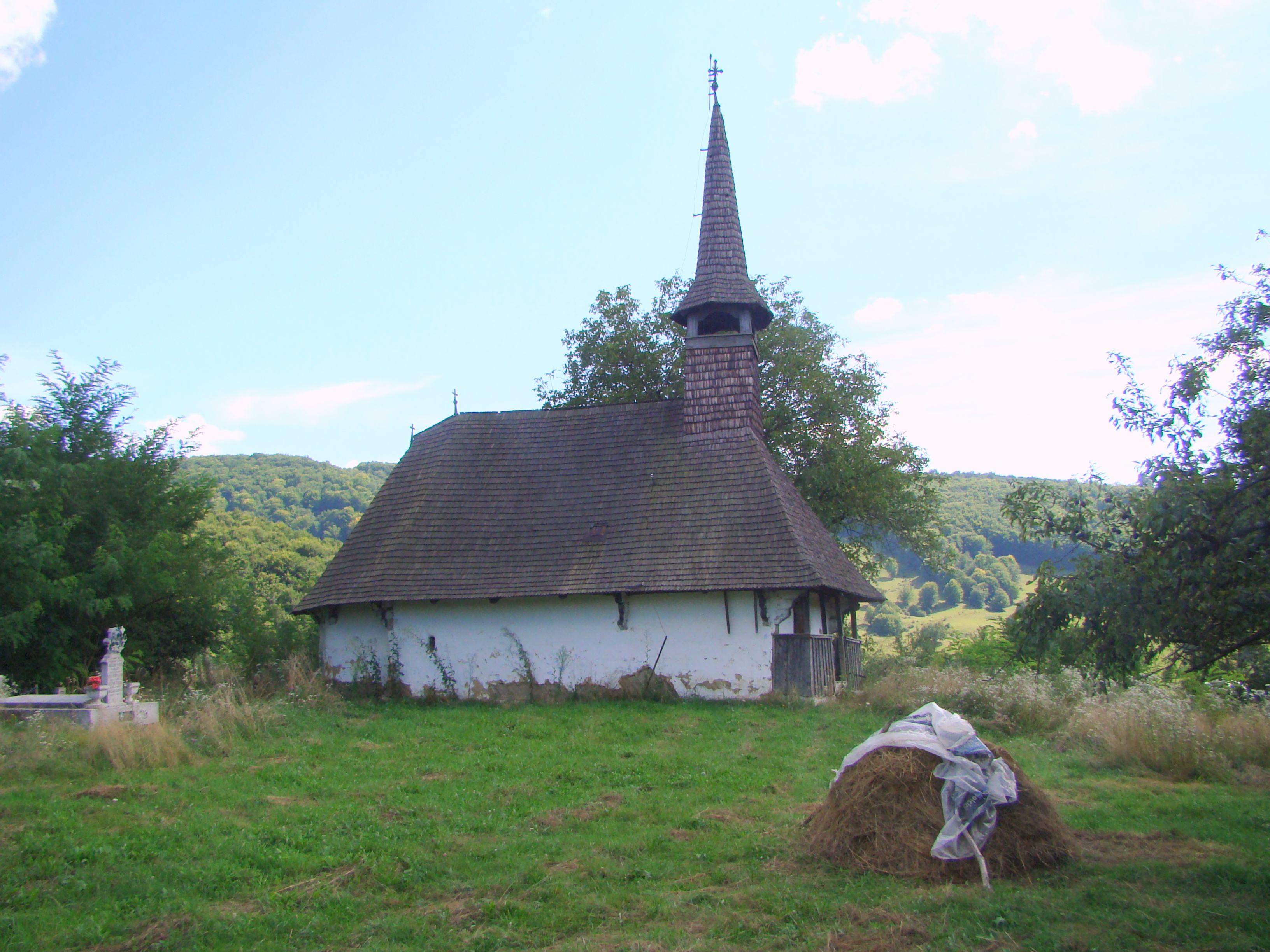 Biserica de lemn „Sf. Arhangheli Mihail și Gavriil”, sat Fâșca; comuna Vârciorog